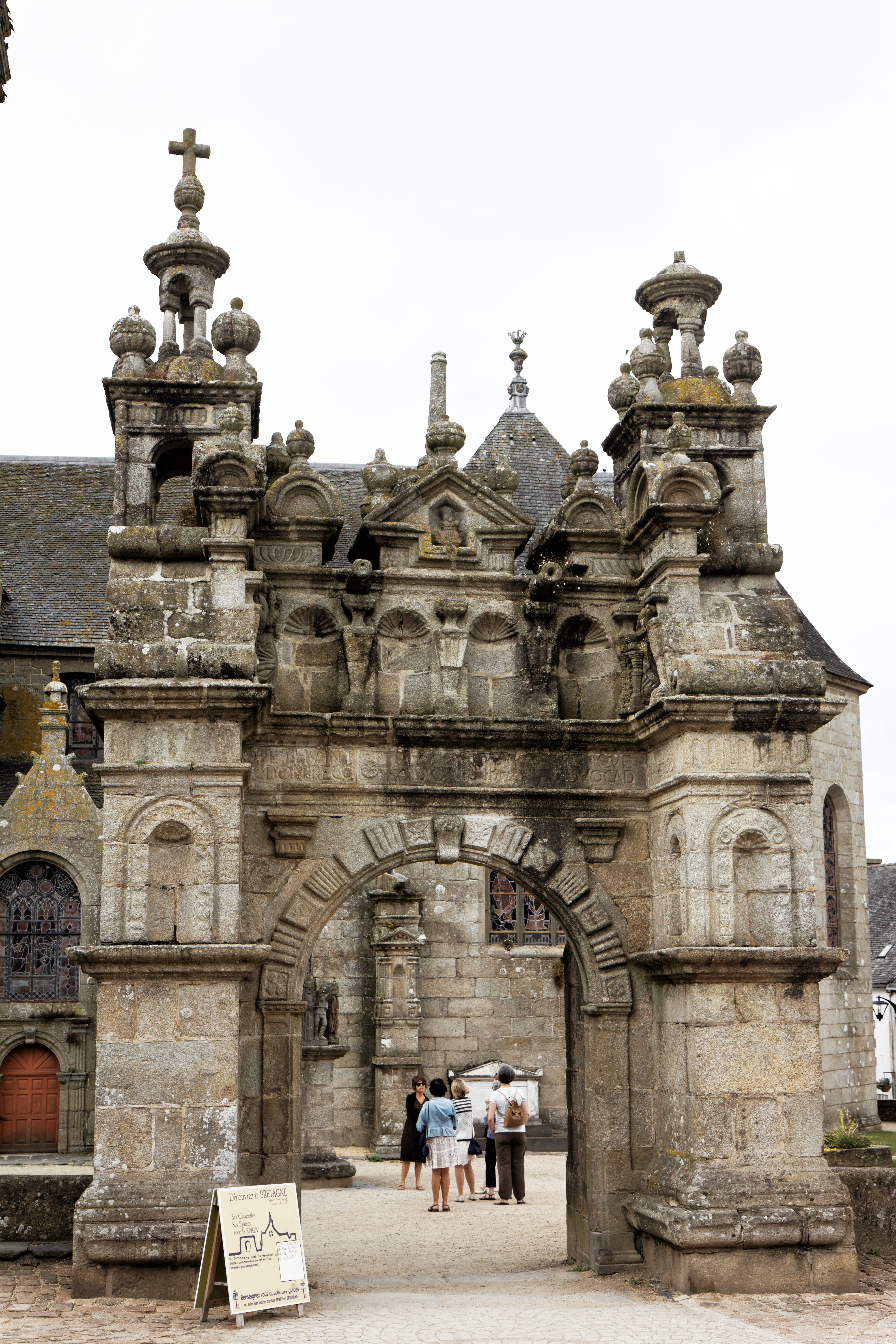 L'enclos paroissial de Saint Thegonec dans le Finistère.